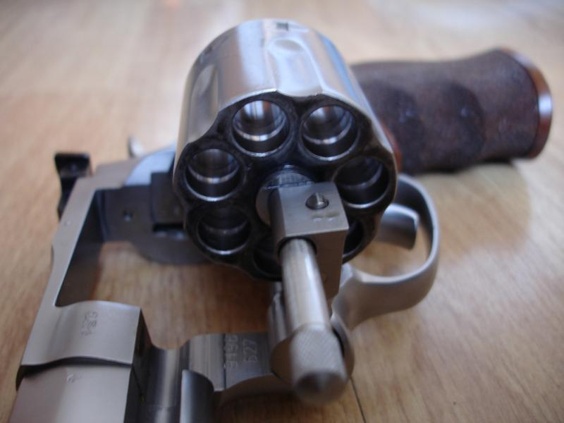 Taurus 627-KLM .357MAG (TRACKER)